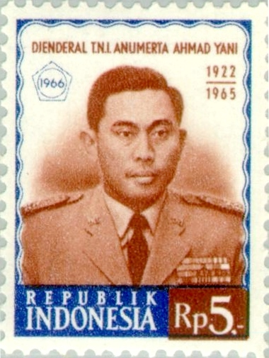 Ahmad Yani